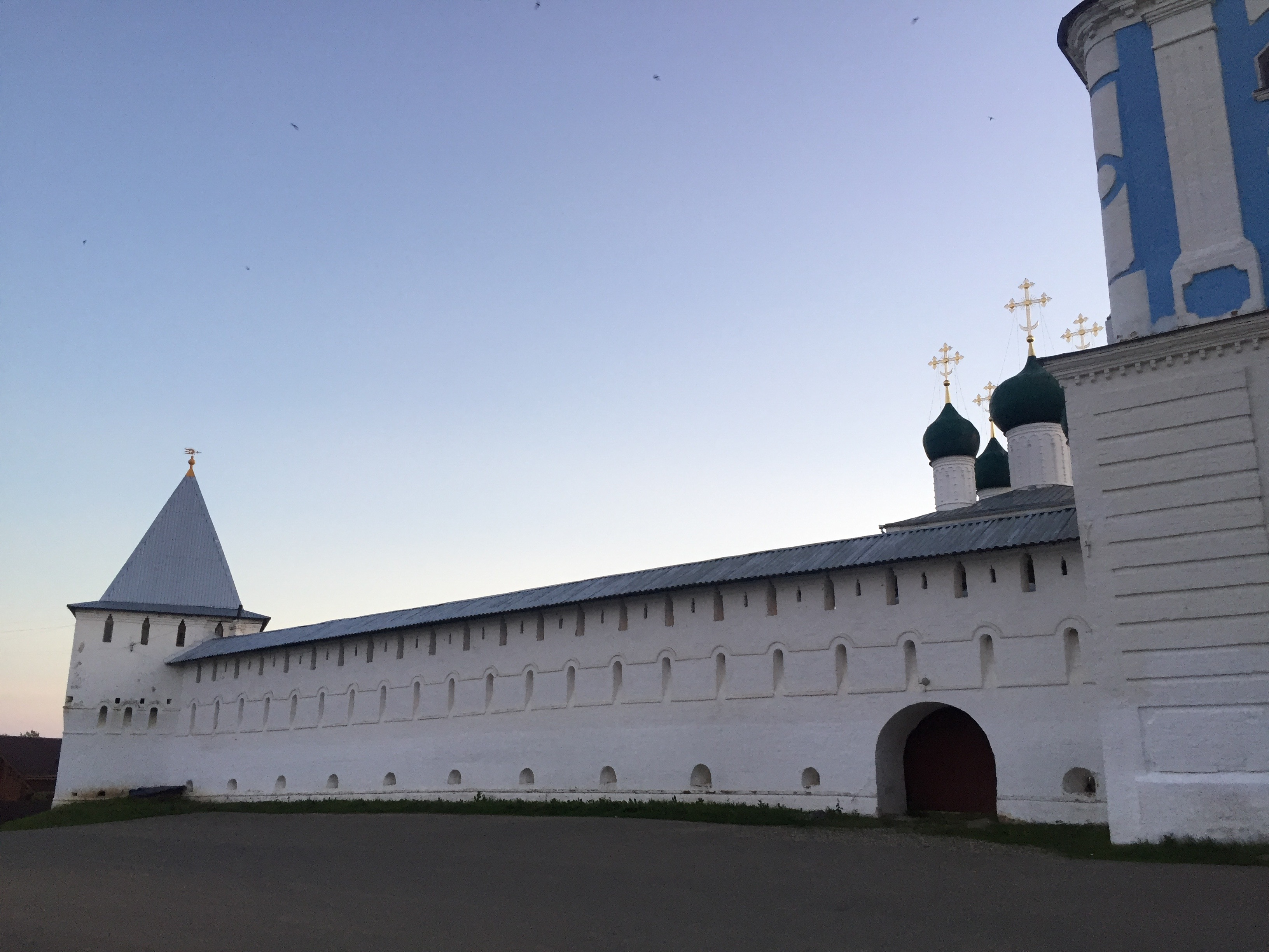 Стены Никитского монастыря